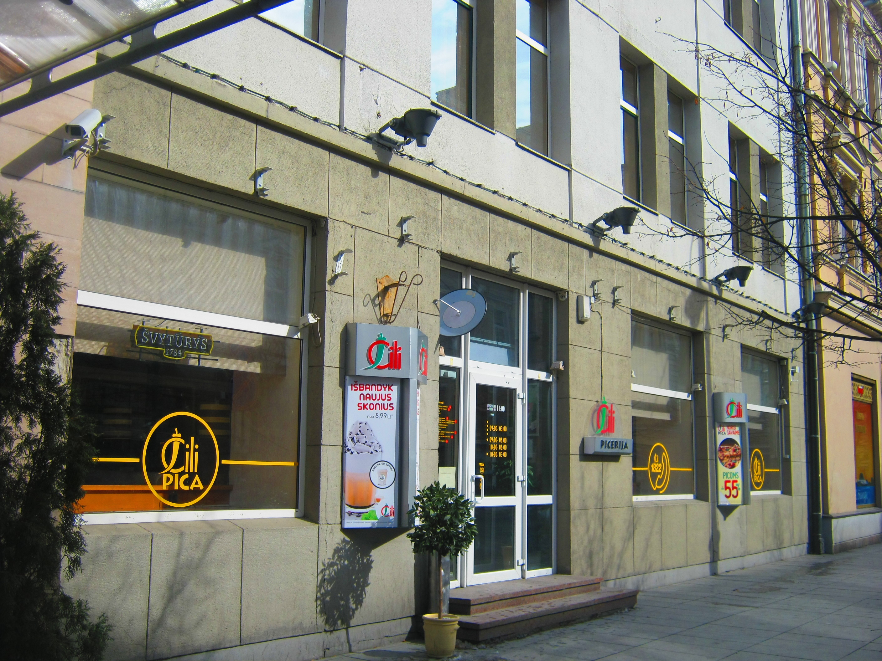 Vilnius